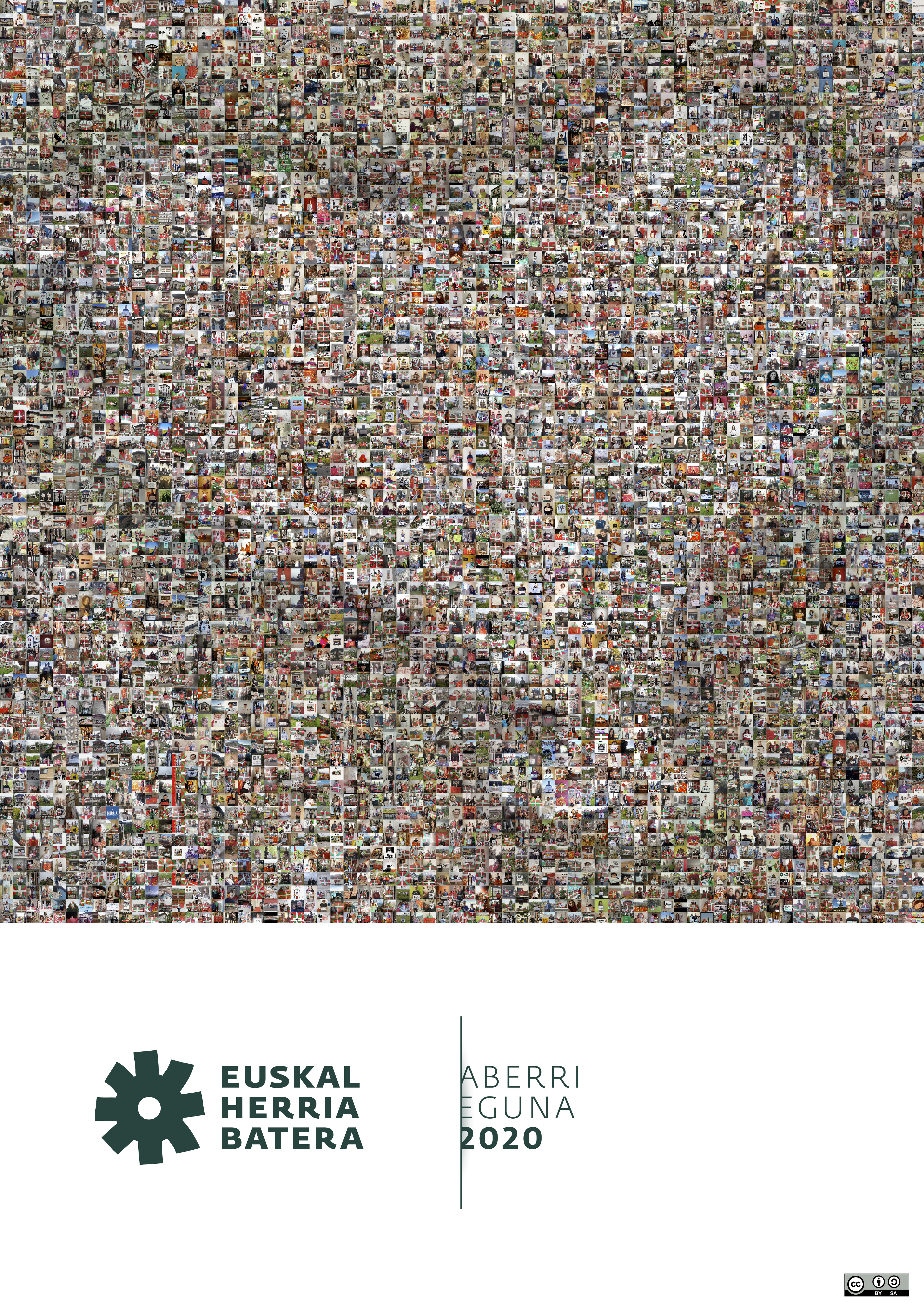 2020ko Euskal Herria Batera Aberri Eguneko posterra, kalitate handian.